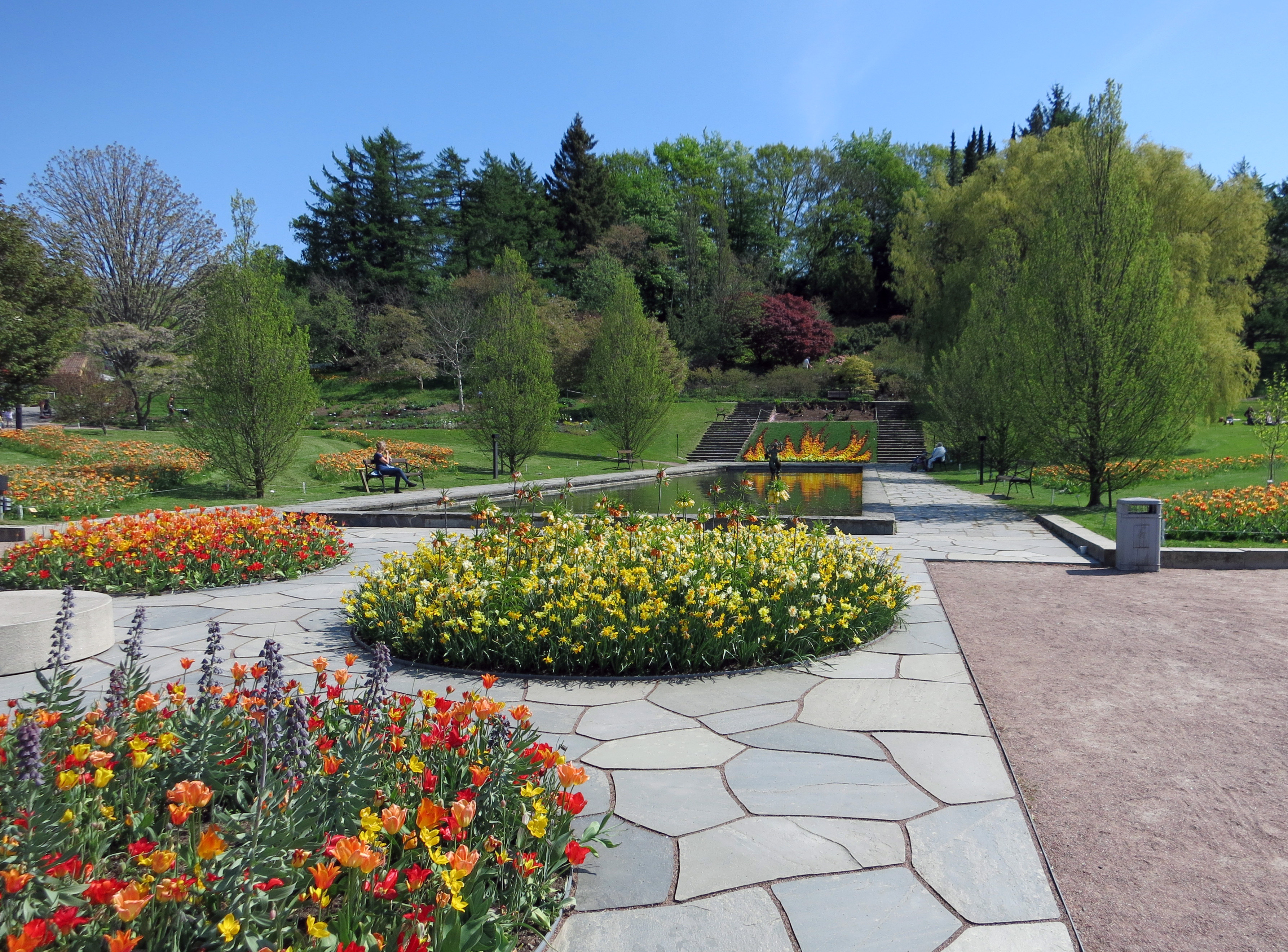 Göteborgs Botaniska Trädgård. Spegeldammen med tema Vild vår 2016.